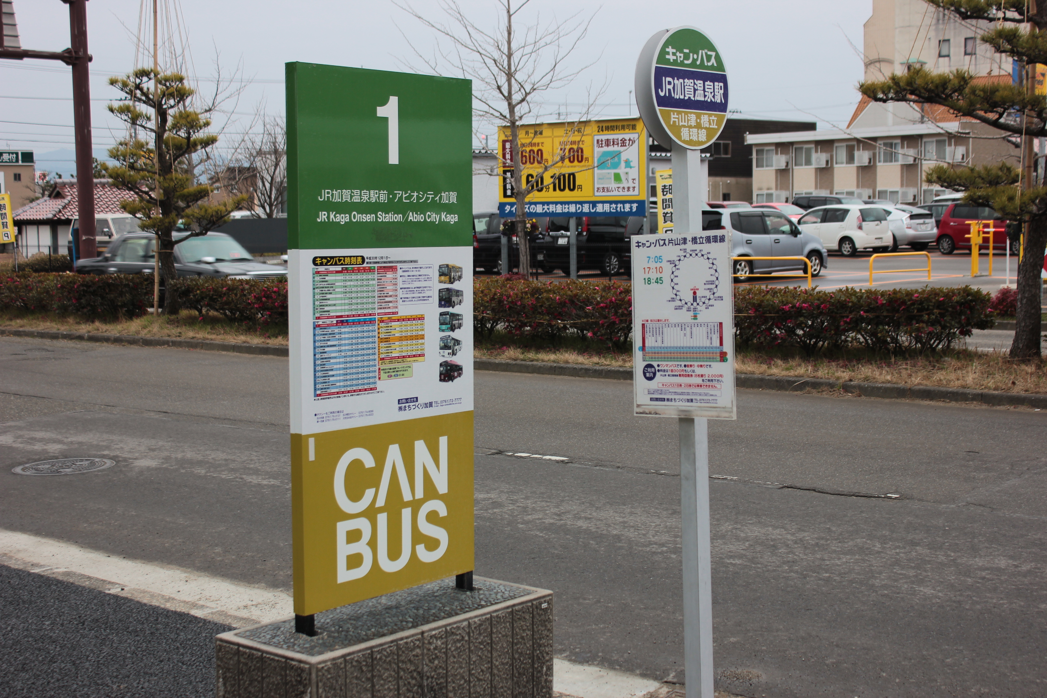 加賀周遊バス「キャン・バス」の加賀温泉駅前バス停。 Canon EOS Kiss X5